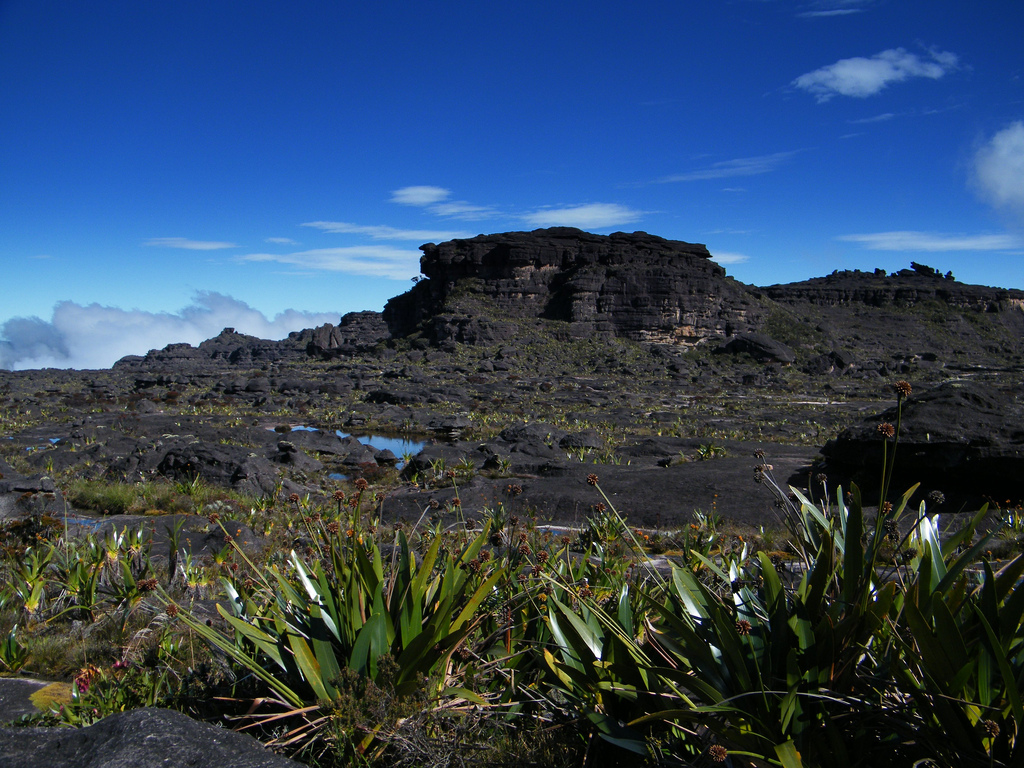 Maverick Stone, mount Roraima, Venezuela